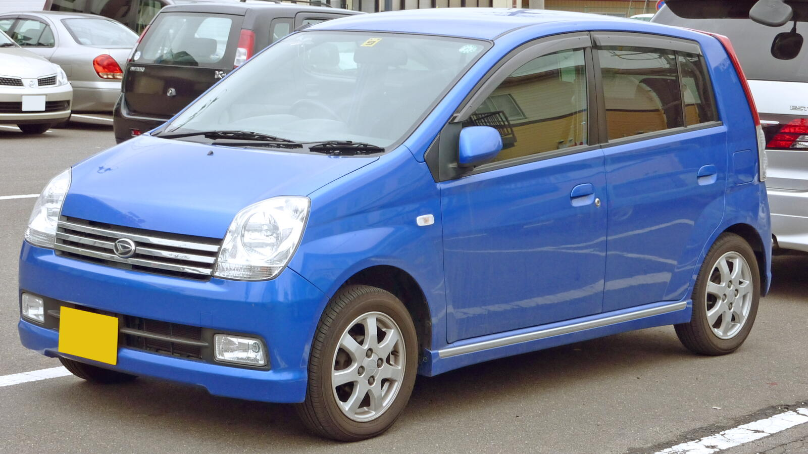 ダイハツ・ミラアヴィ